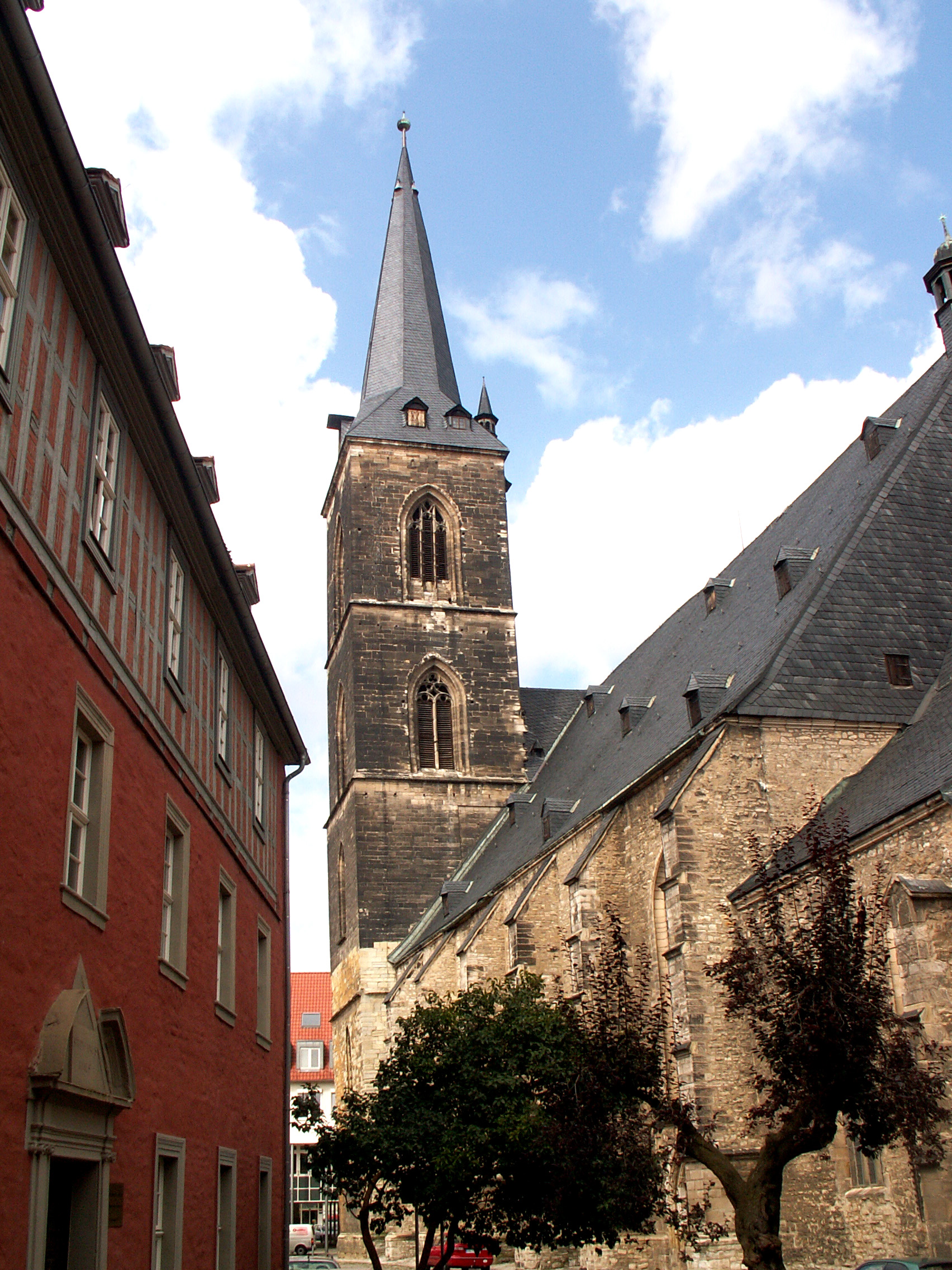 Ansicht der St.Stephanikirche in Aschersleben von Osten